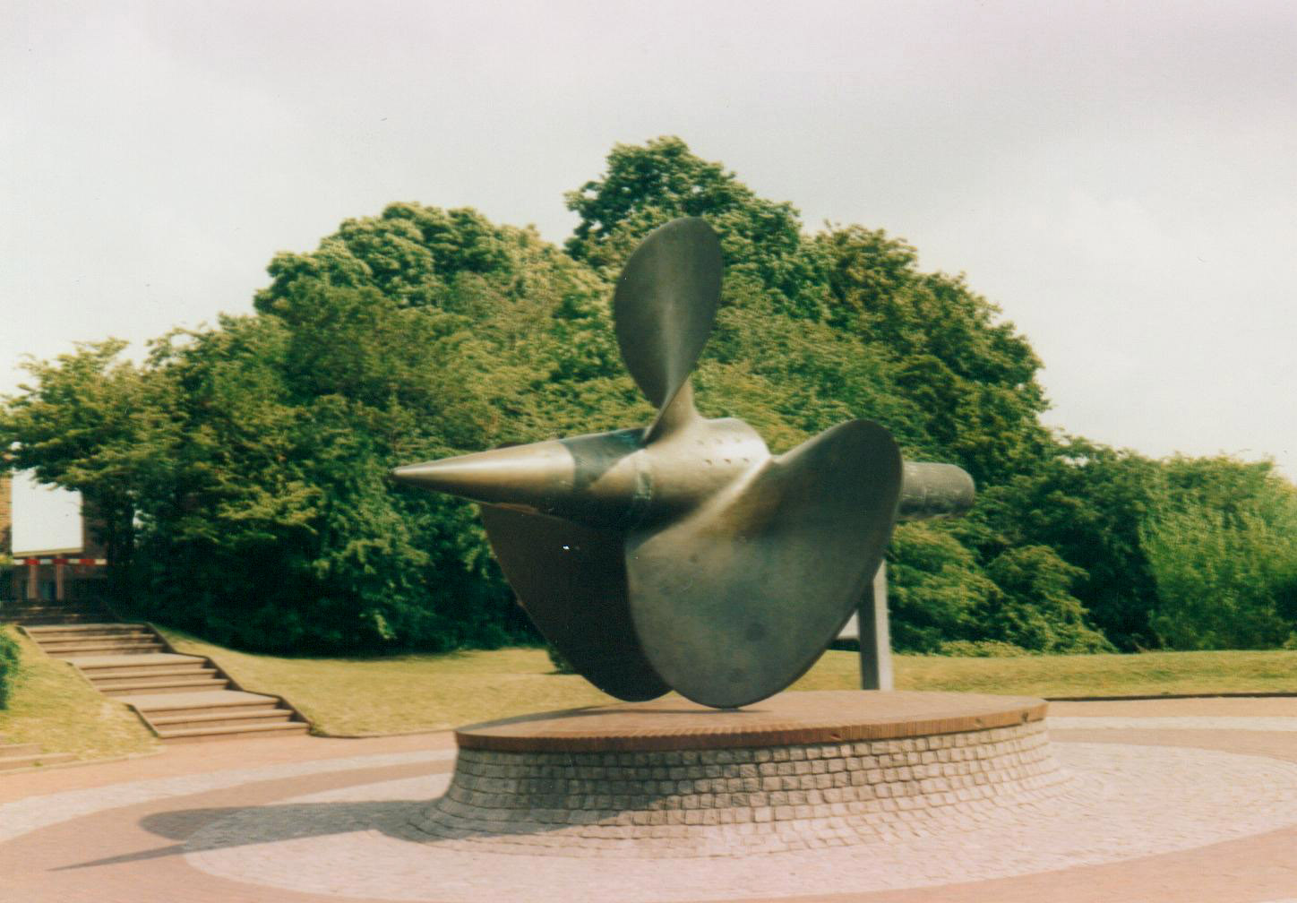 Propeller der Prinz Eugen